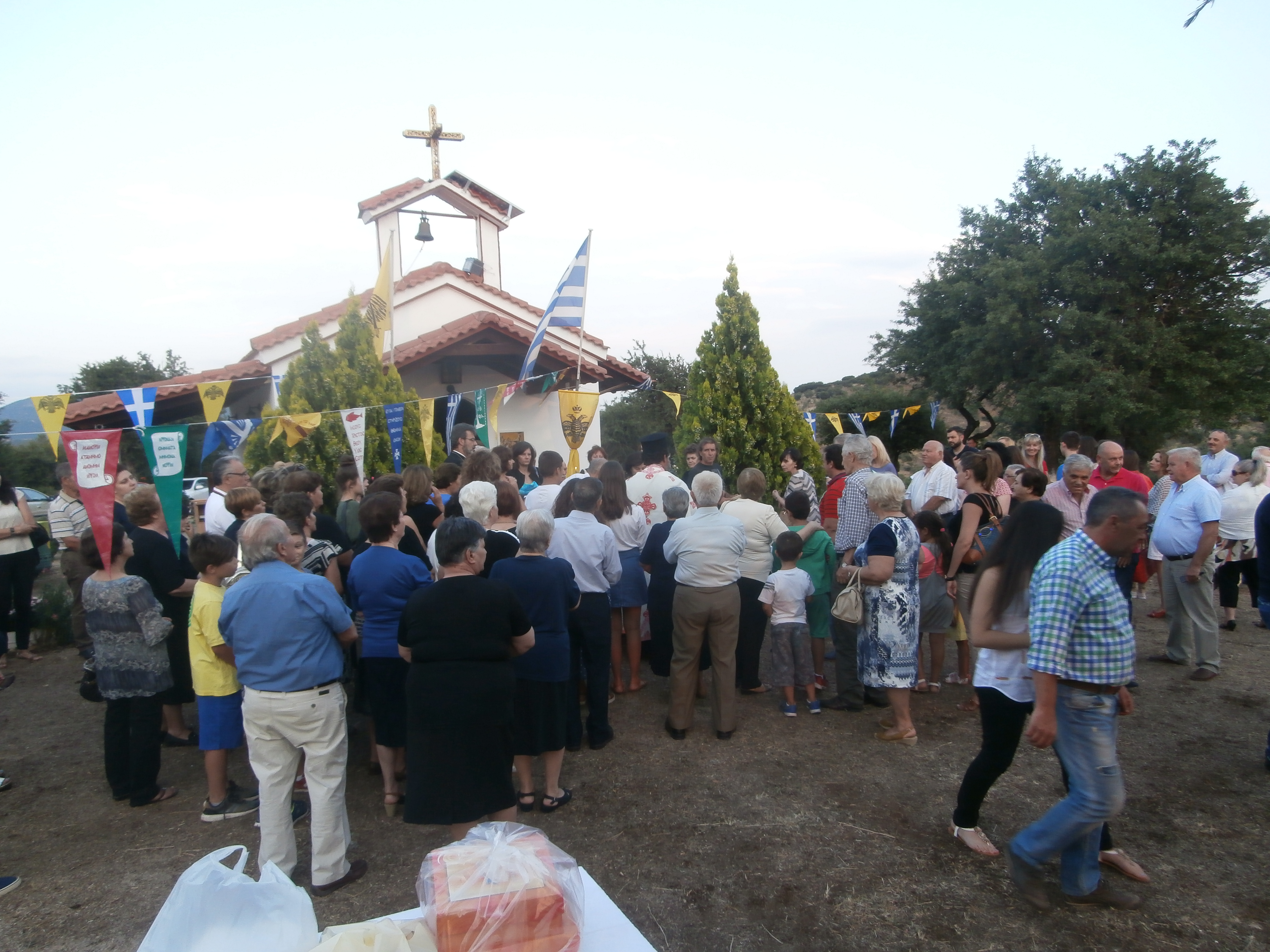 ΚΑΛΑΜΑΚΙ ΛΑΜΙΑΣ